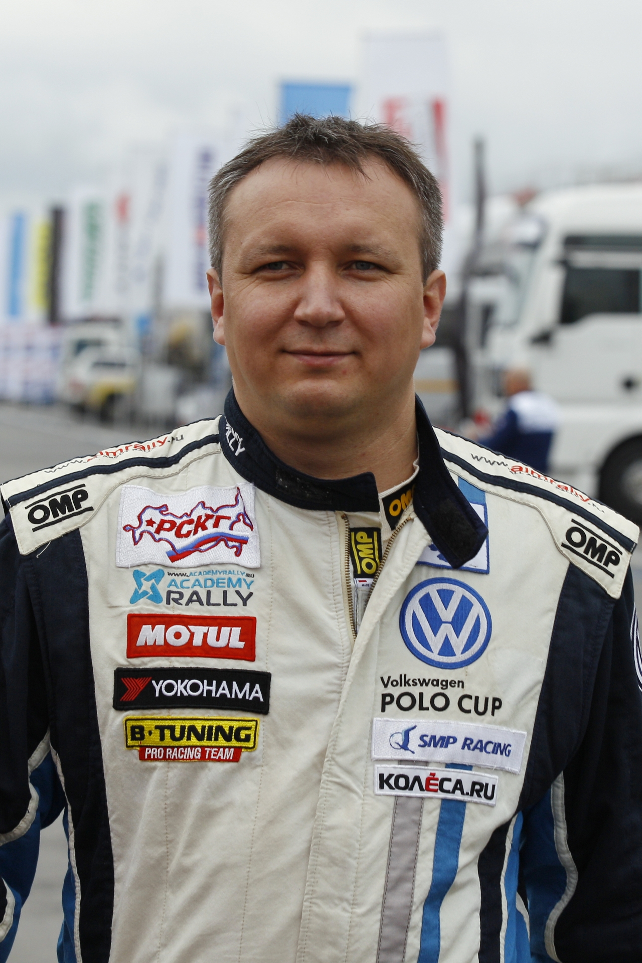 Автогонщик Андрей Севастьянов